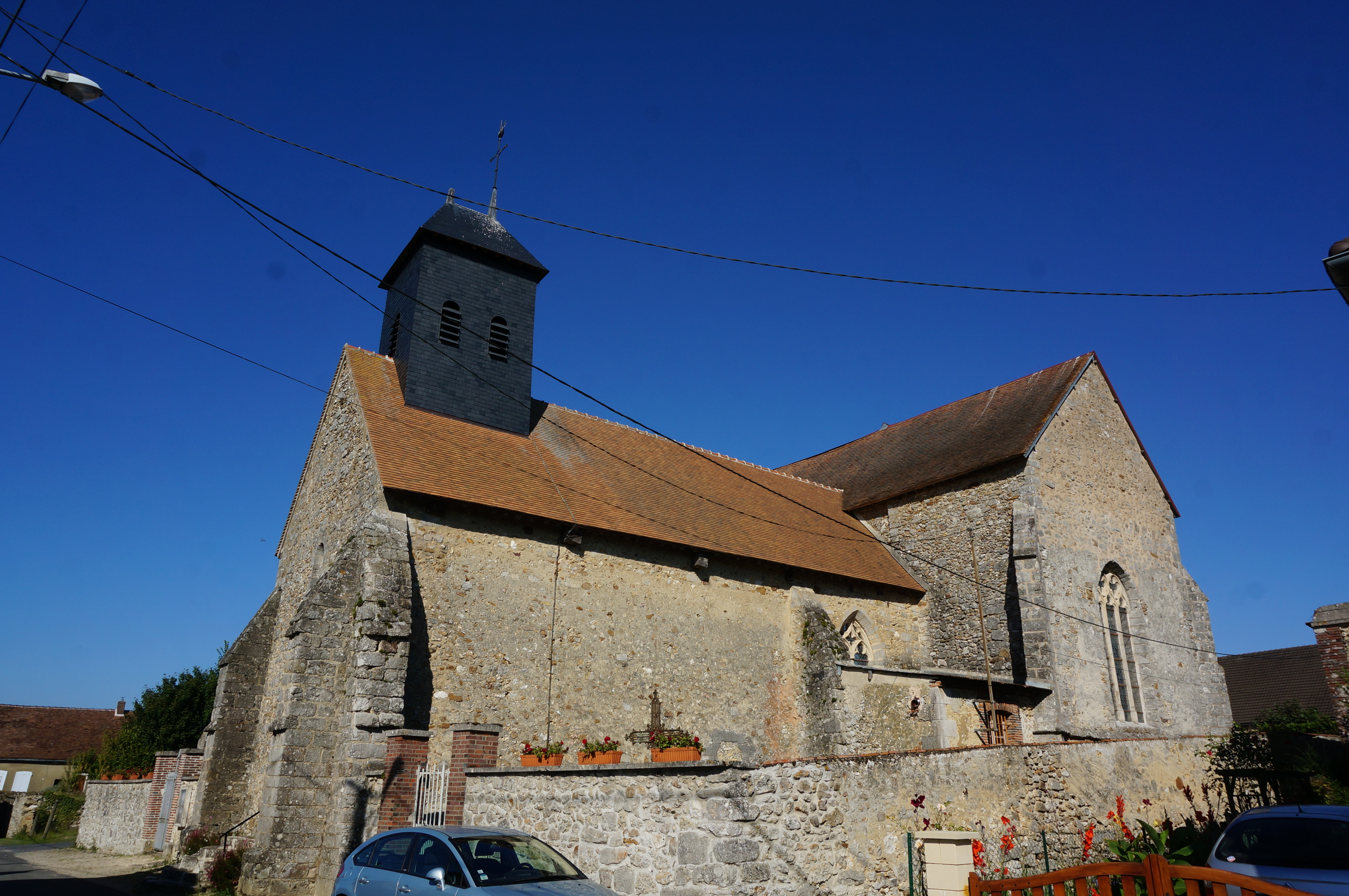 vue d el'église.